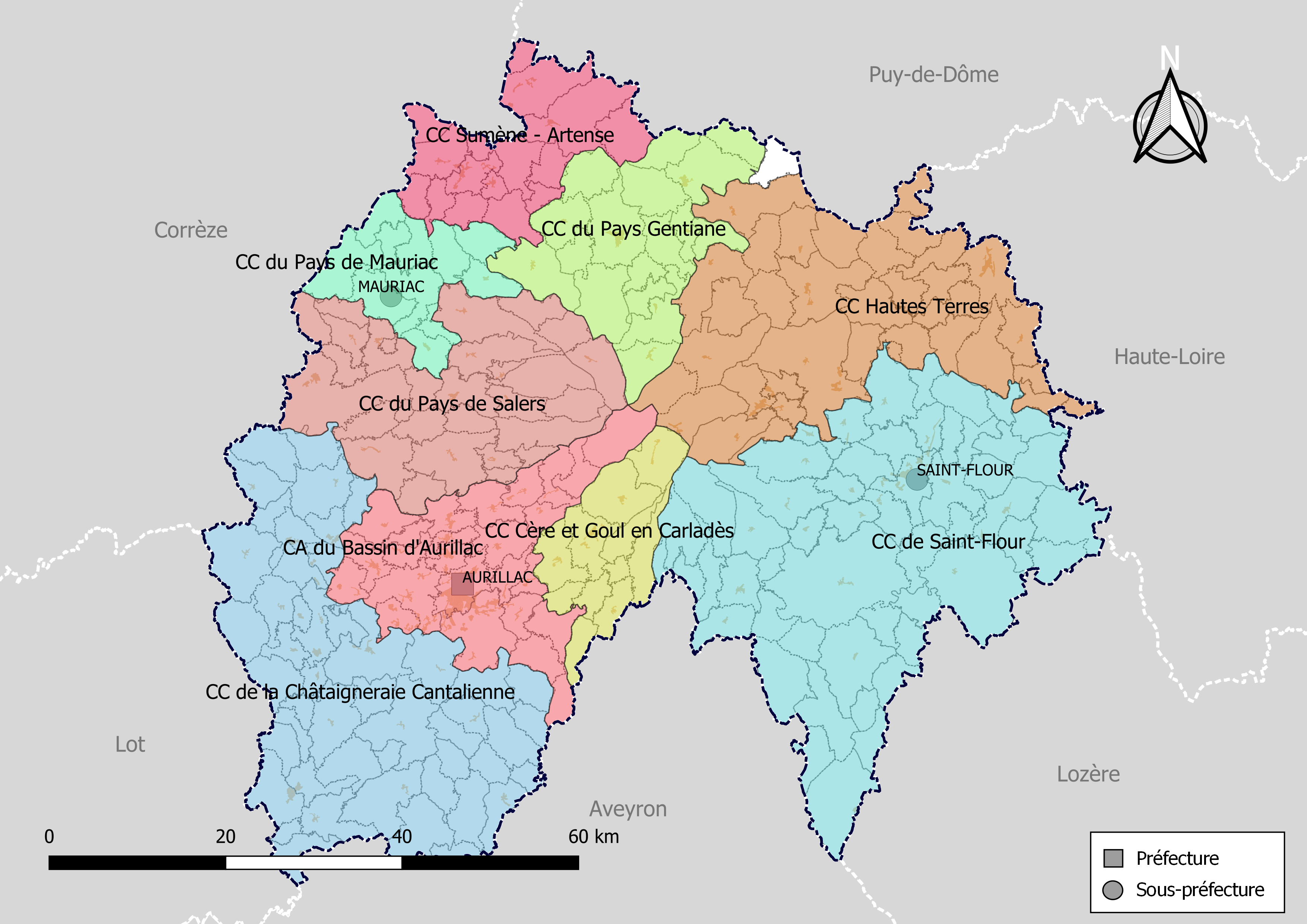 Carte des intercommunalités du département du Cantal, France. Composition au 1er janvier 2019